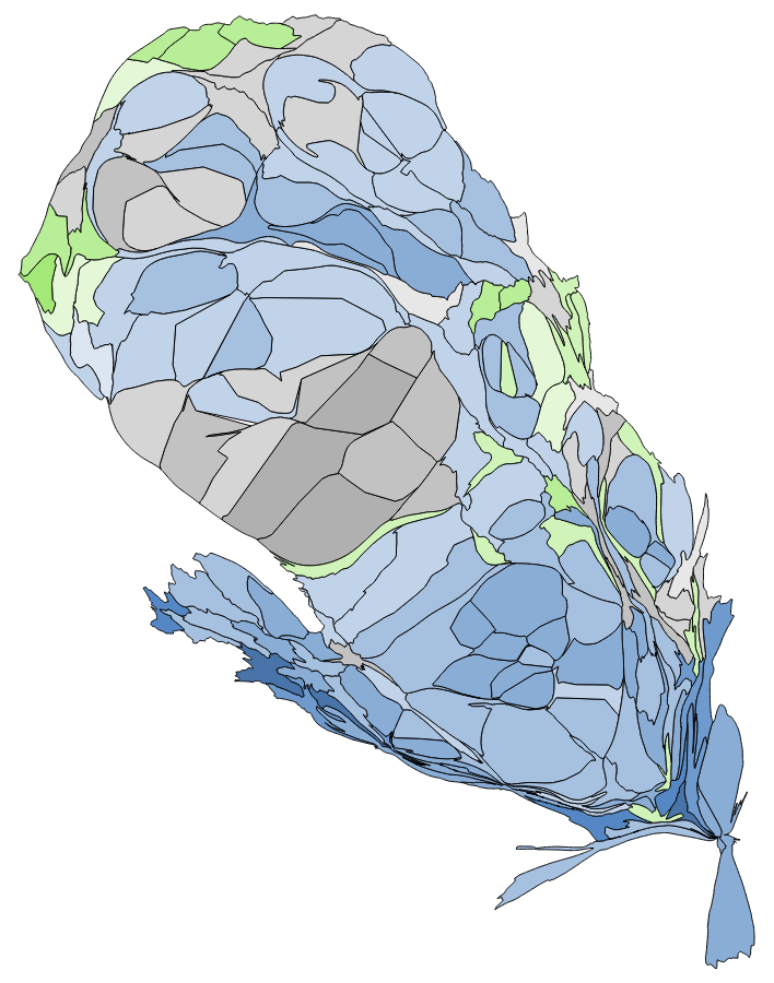 顏色對照表